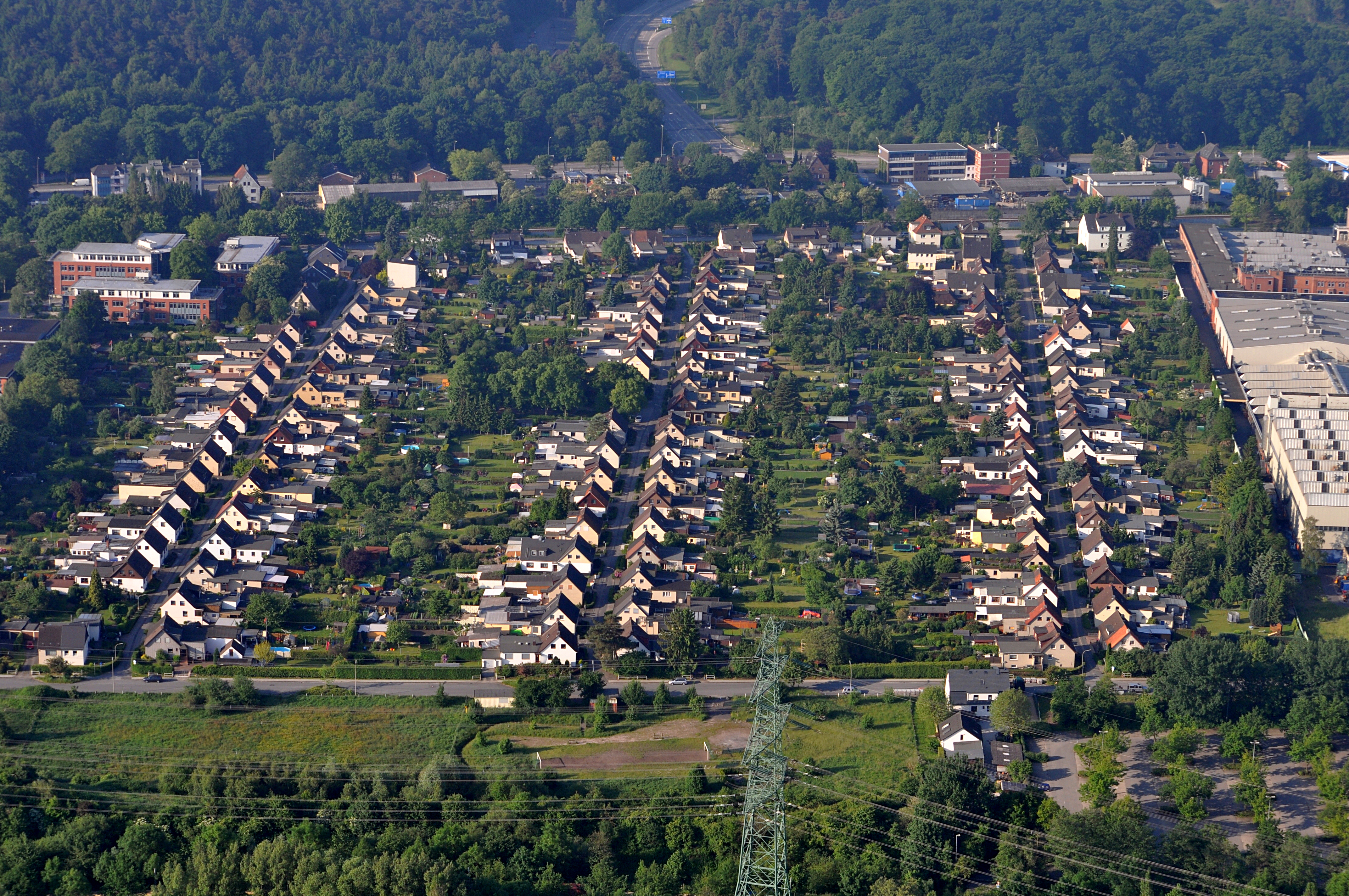 Siedlung Bostelbek in Hamburg-Heimfeld.